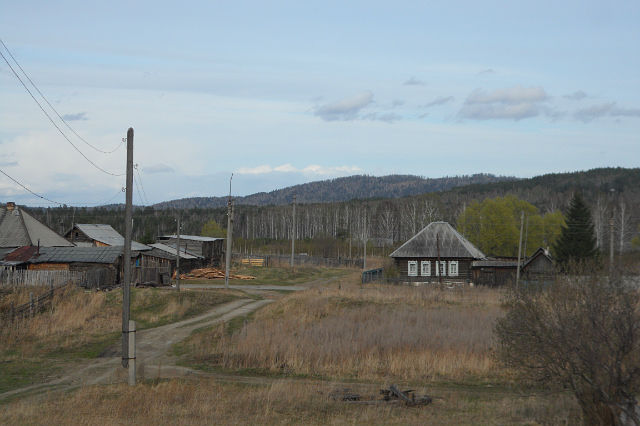 Вид посёлка Северная Кузнечиха